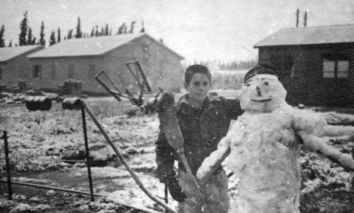 בתמונה - אורי אילן ובובת השלג.